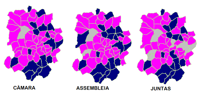 Partido mais votado por Freguesia